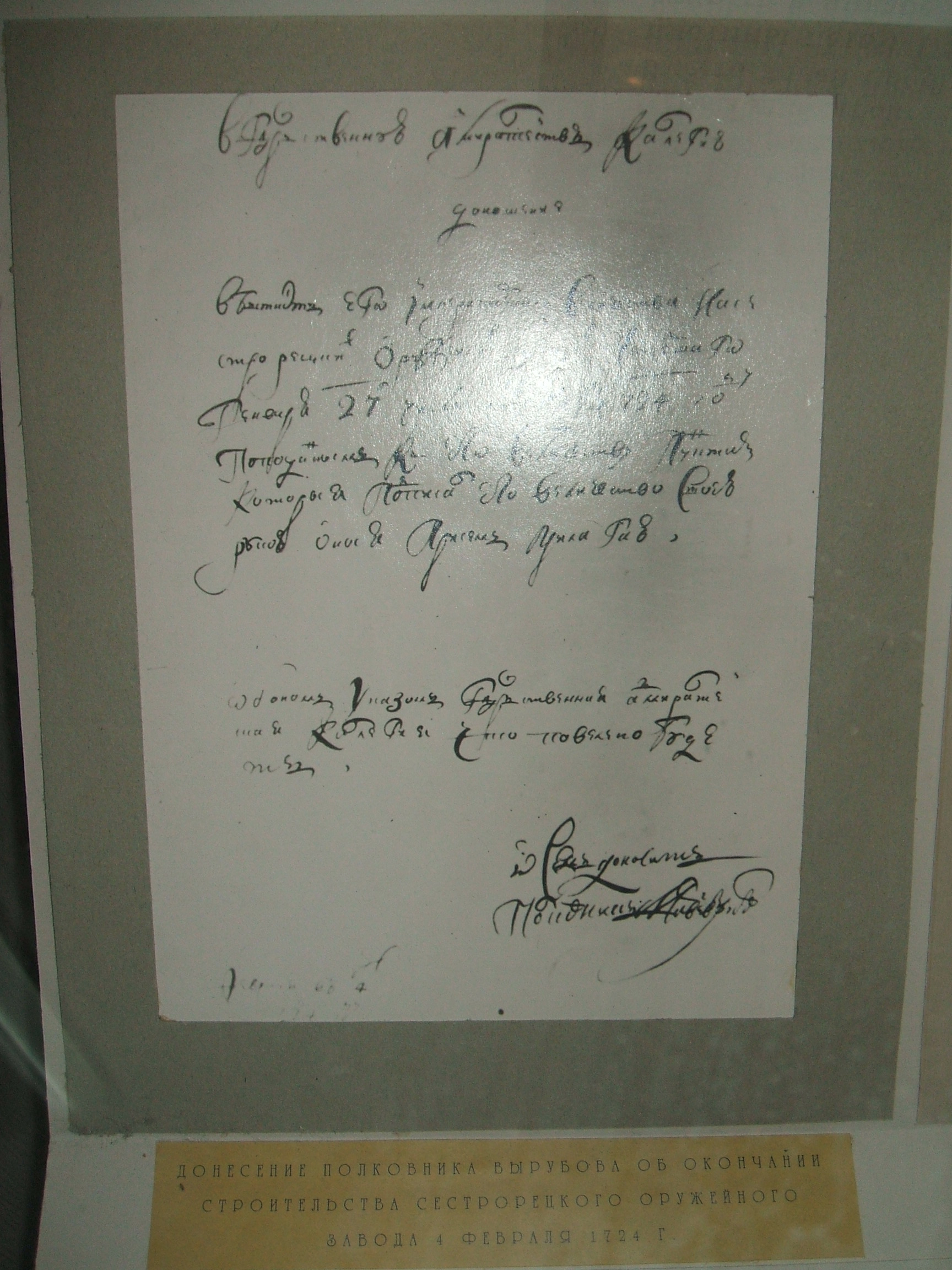 Донесение поковника Вырубова о завершении строительства Сестрорецкого оружейного завода